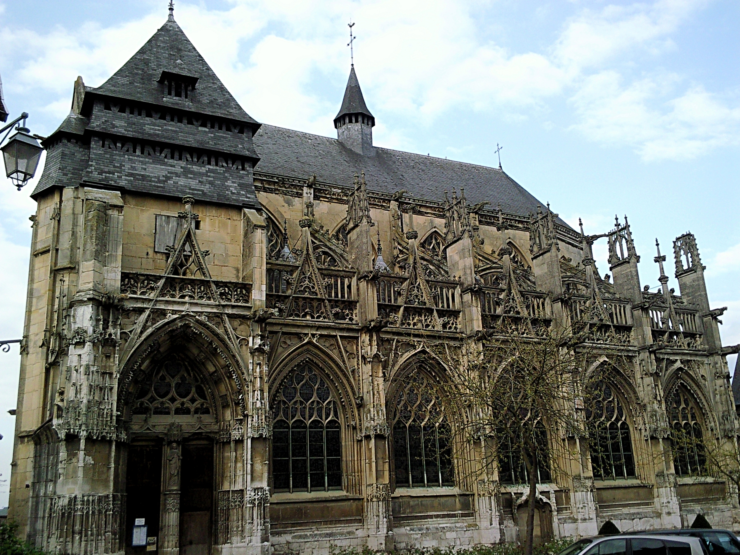 L'église Notre-Dame-des-arts (autrefois Saint-Vigor) à Pont-de-l'Arche (Eure).